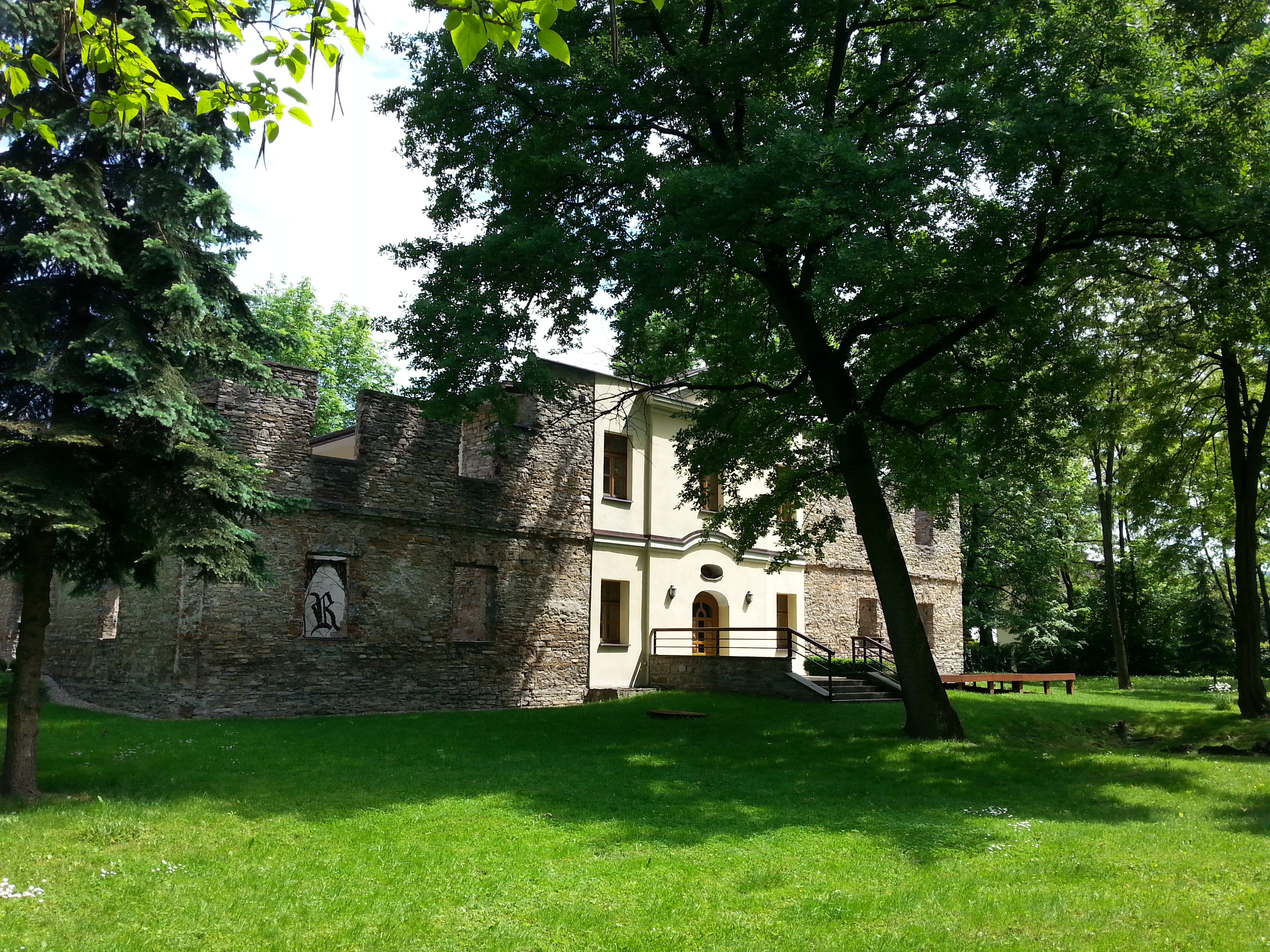 ruiny dworu Kossaków w Gurkach Wielkich woj. śląskie